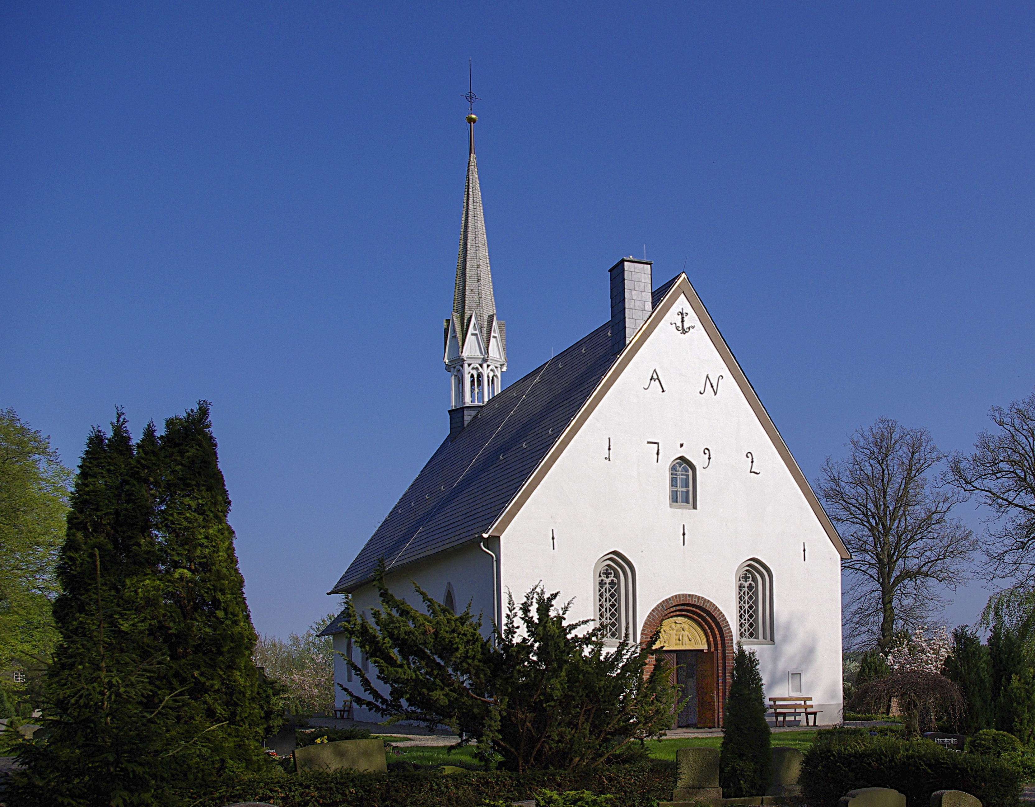 Oersberg in Schleswig-Holstein. Die Kirche im Ortsteil Toestrup steht unter Denkmalschutz.